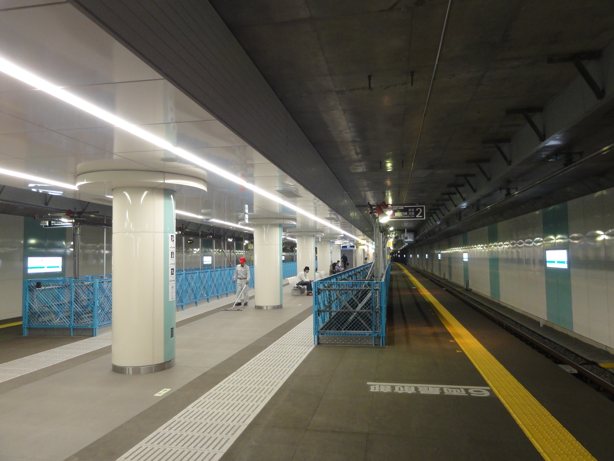 小田急電鉄 東北沢駅ホーム（複々線化前、後の緩行線の上にホームがある）